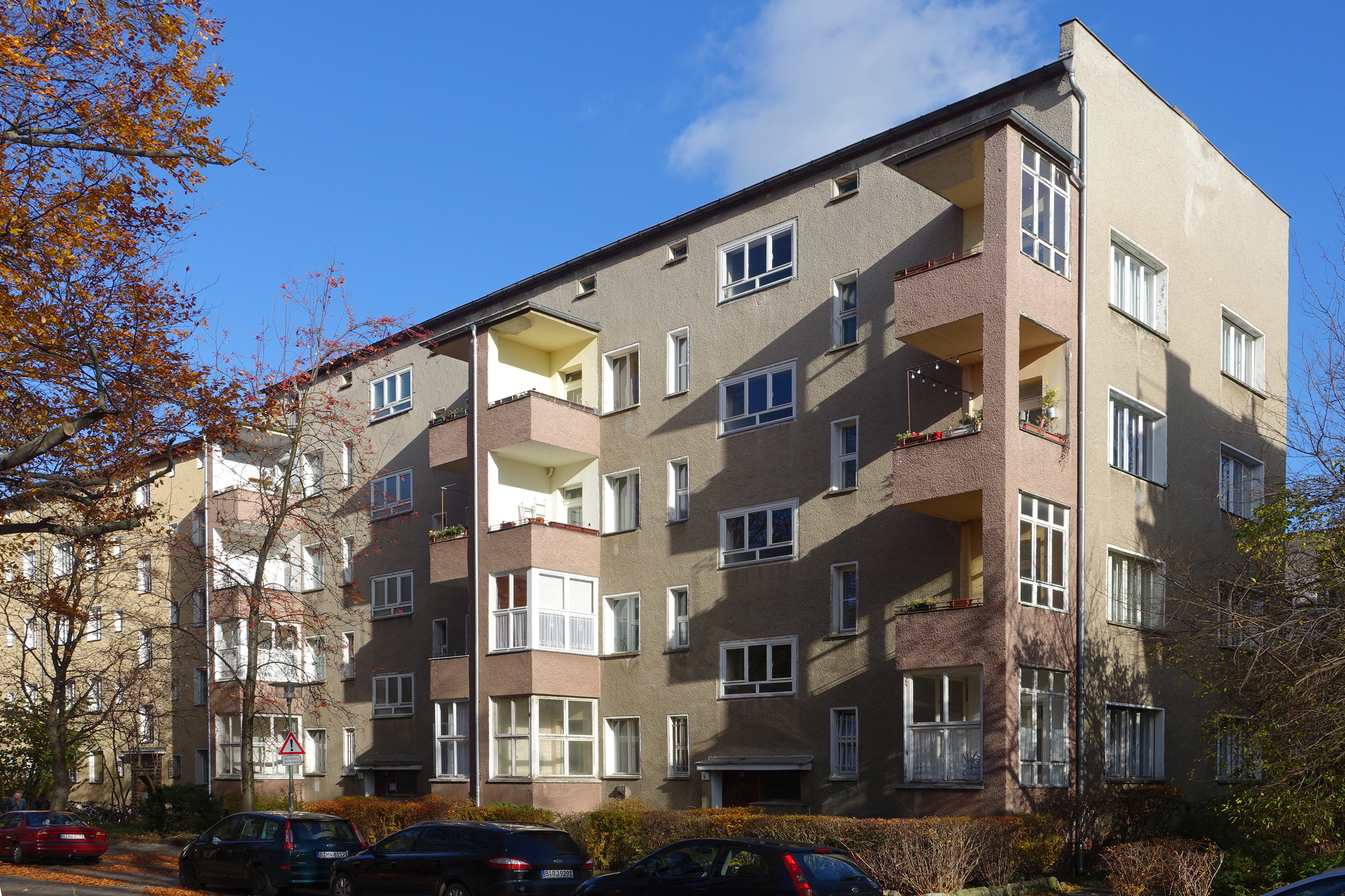 Wohnanlage